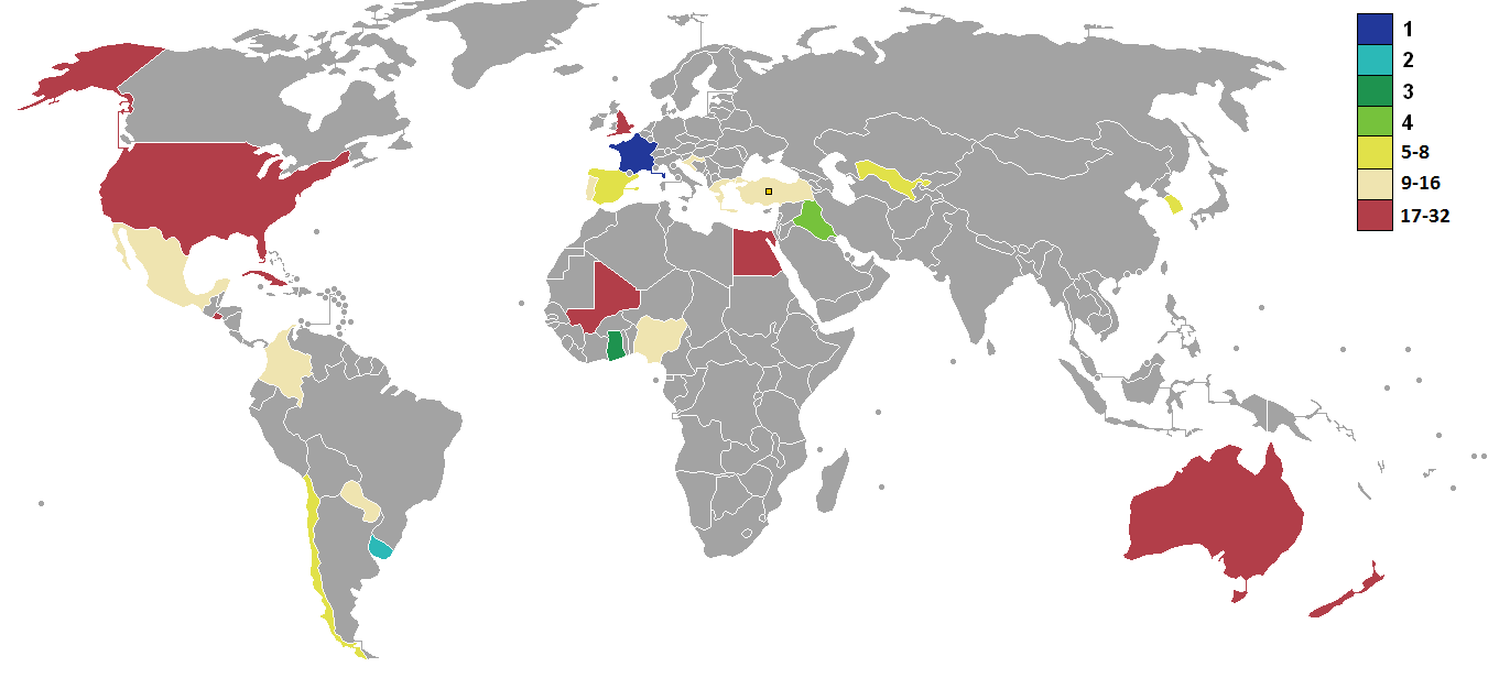 Mapa de los resultados del torneo.